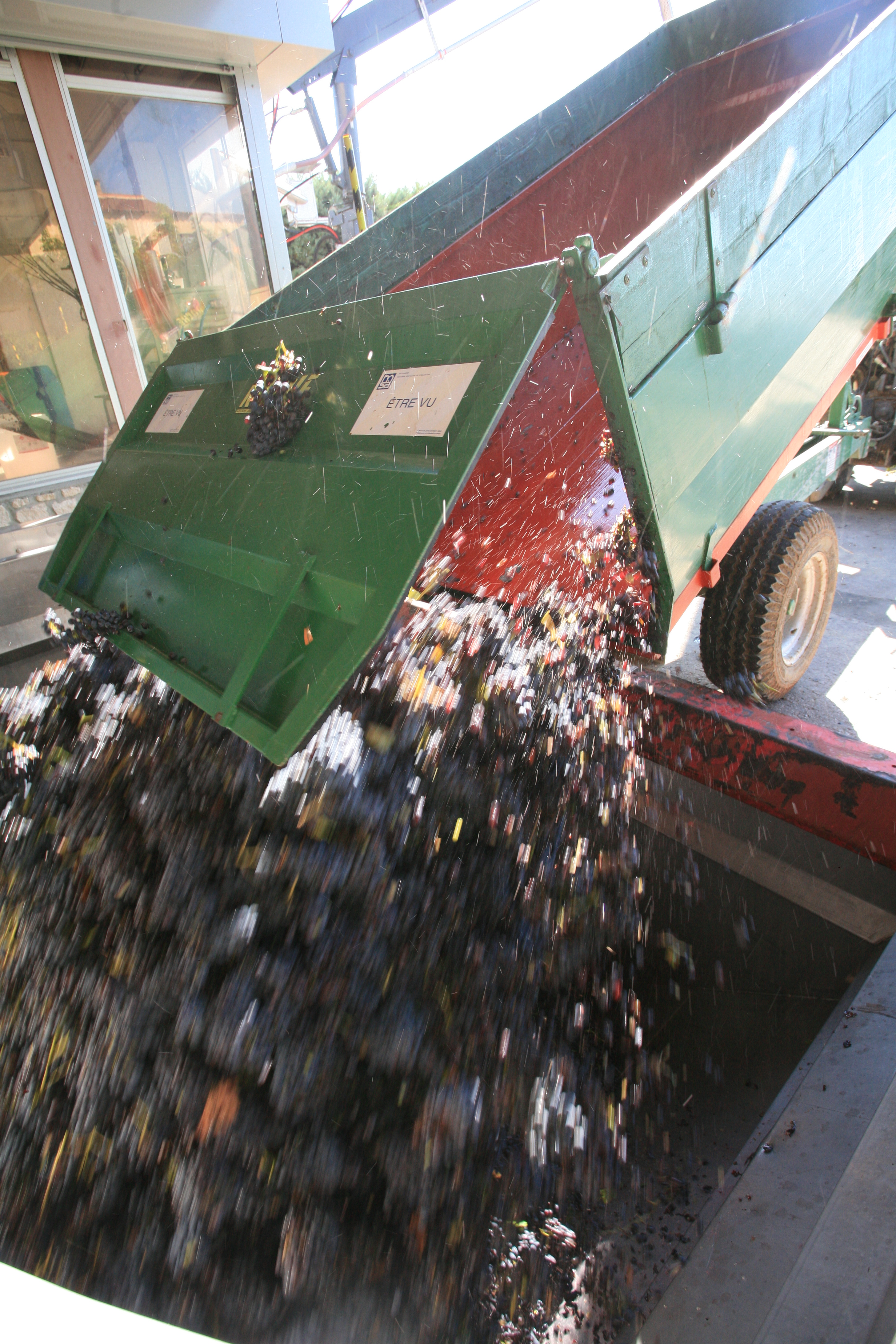 Entleerung eines Traubenwagens in die Annahmestation, Cave de Vacqueyras, France